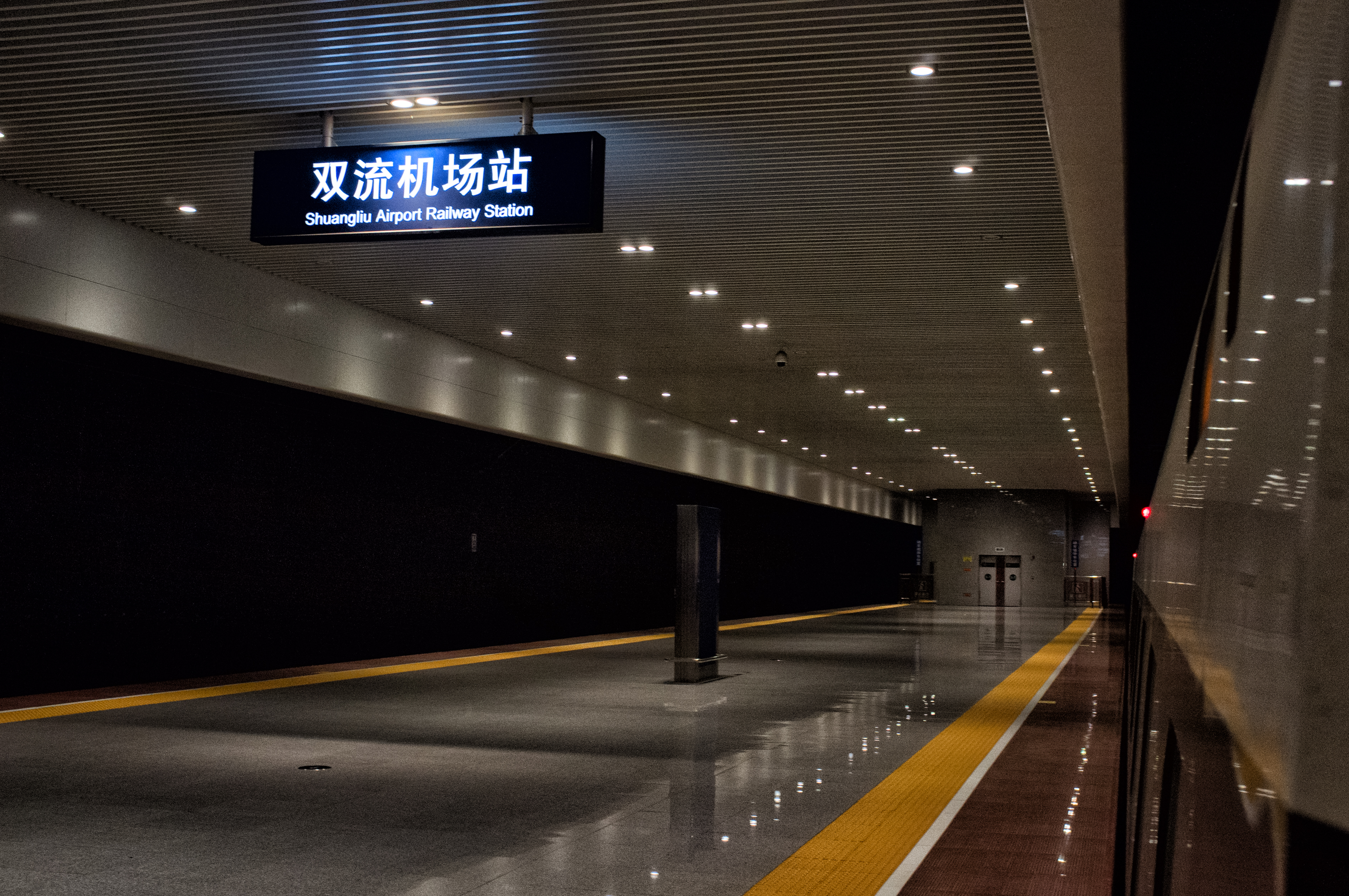 中文（中国大陆）: 国铁双流机场站